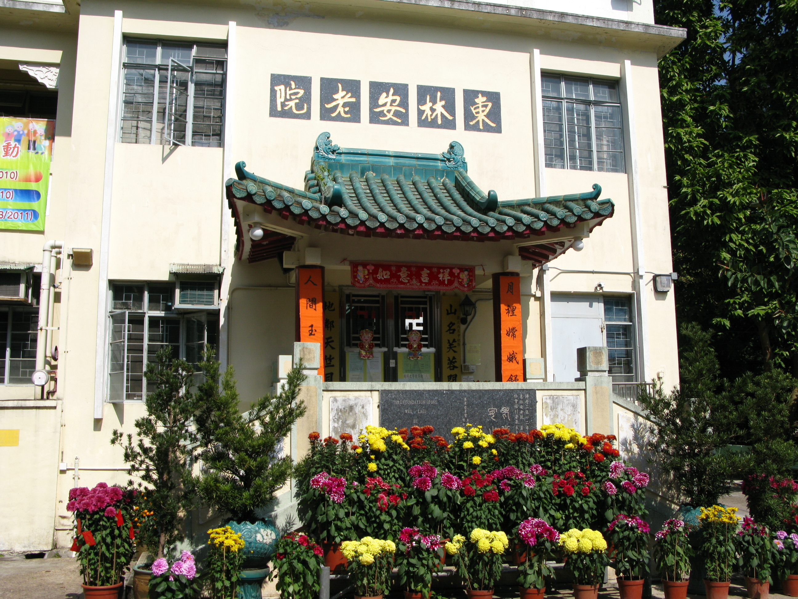 中文（香港）: 香港荃灣芙蓉山東林臺東林念佛堂內東林安老院